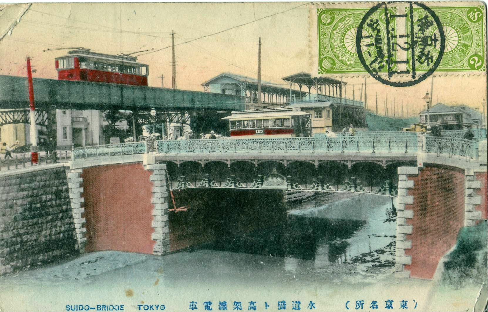 Carte postale ancienneSuido Bridge - TokyoUne traduction approximative des caractères en japonais serait : Quartier célèbre tokyoïte - Suidobashi et le train à caténaires surélevé